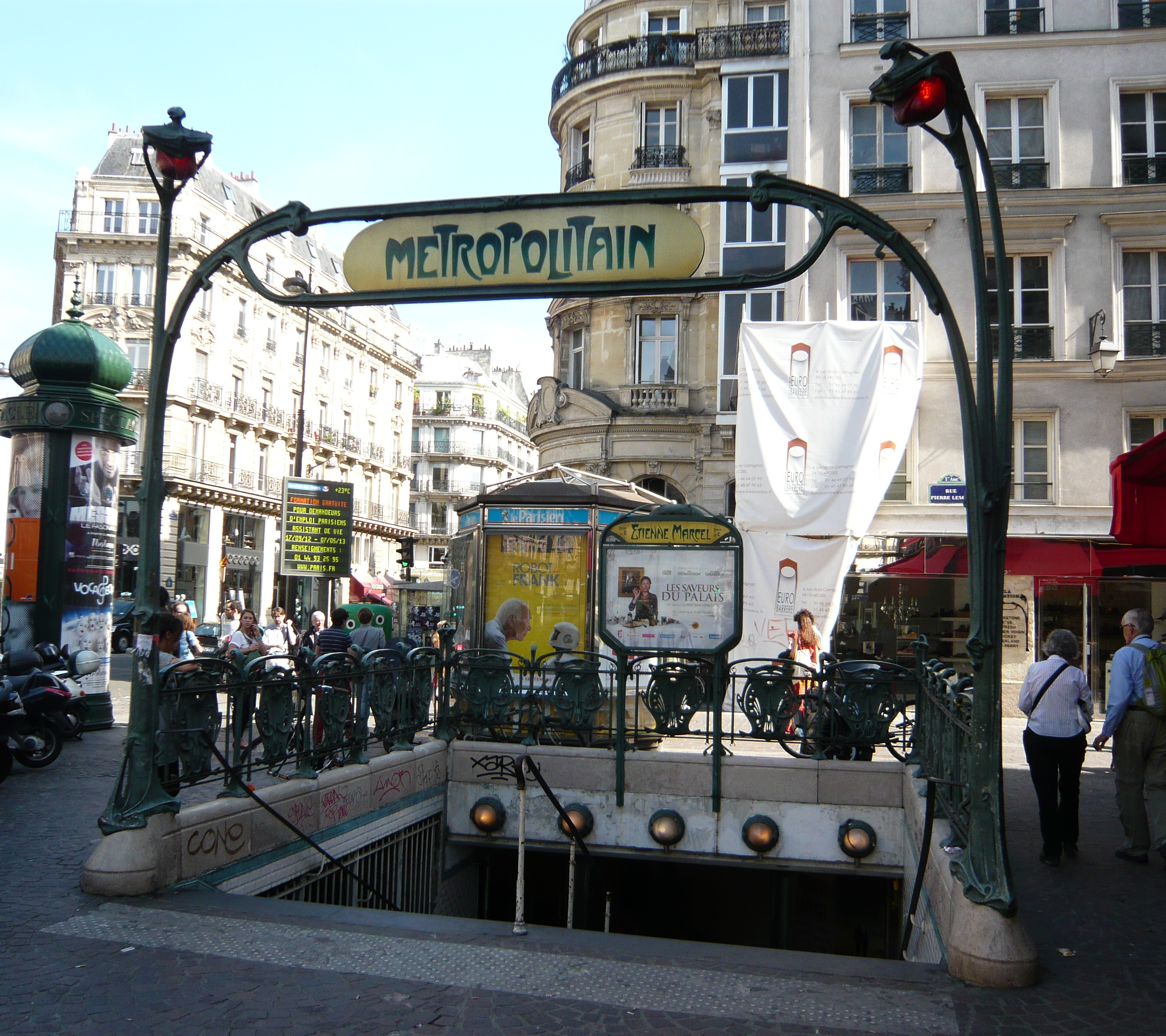 Edicule Guimard Métro Etienne Marcel